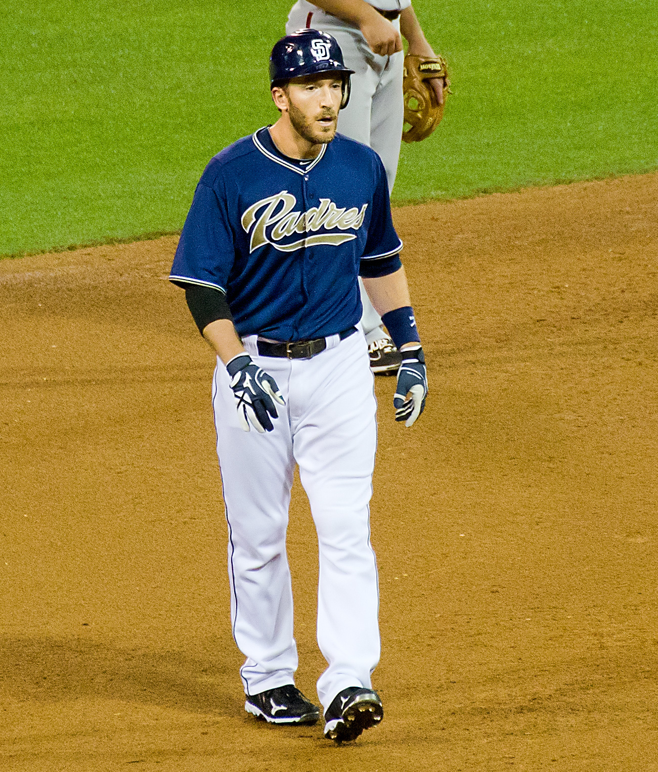 Chris Denorfia